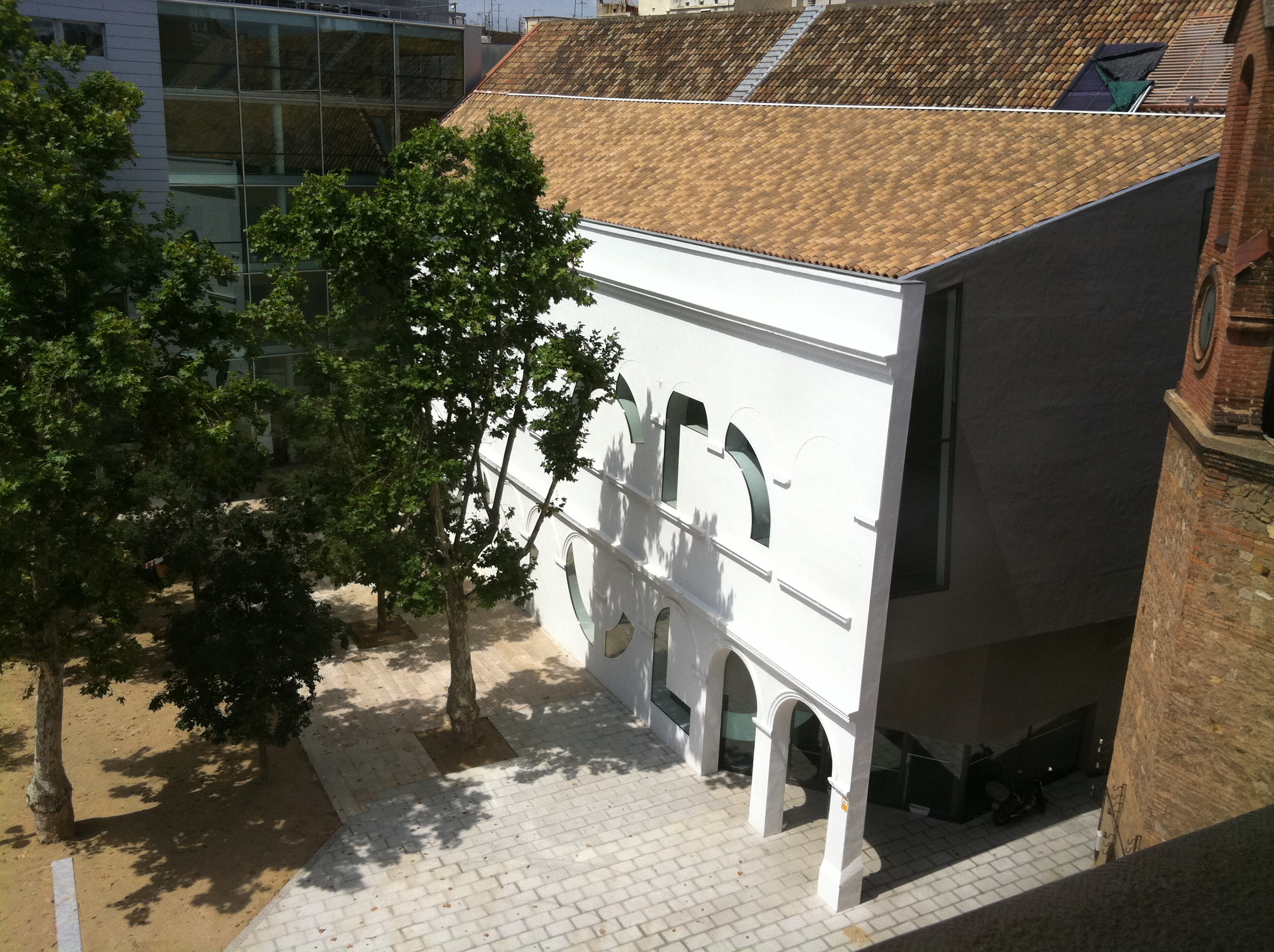 Teatre Cececebe